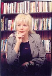 צביה גרנות